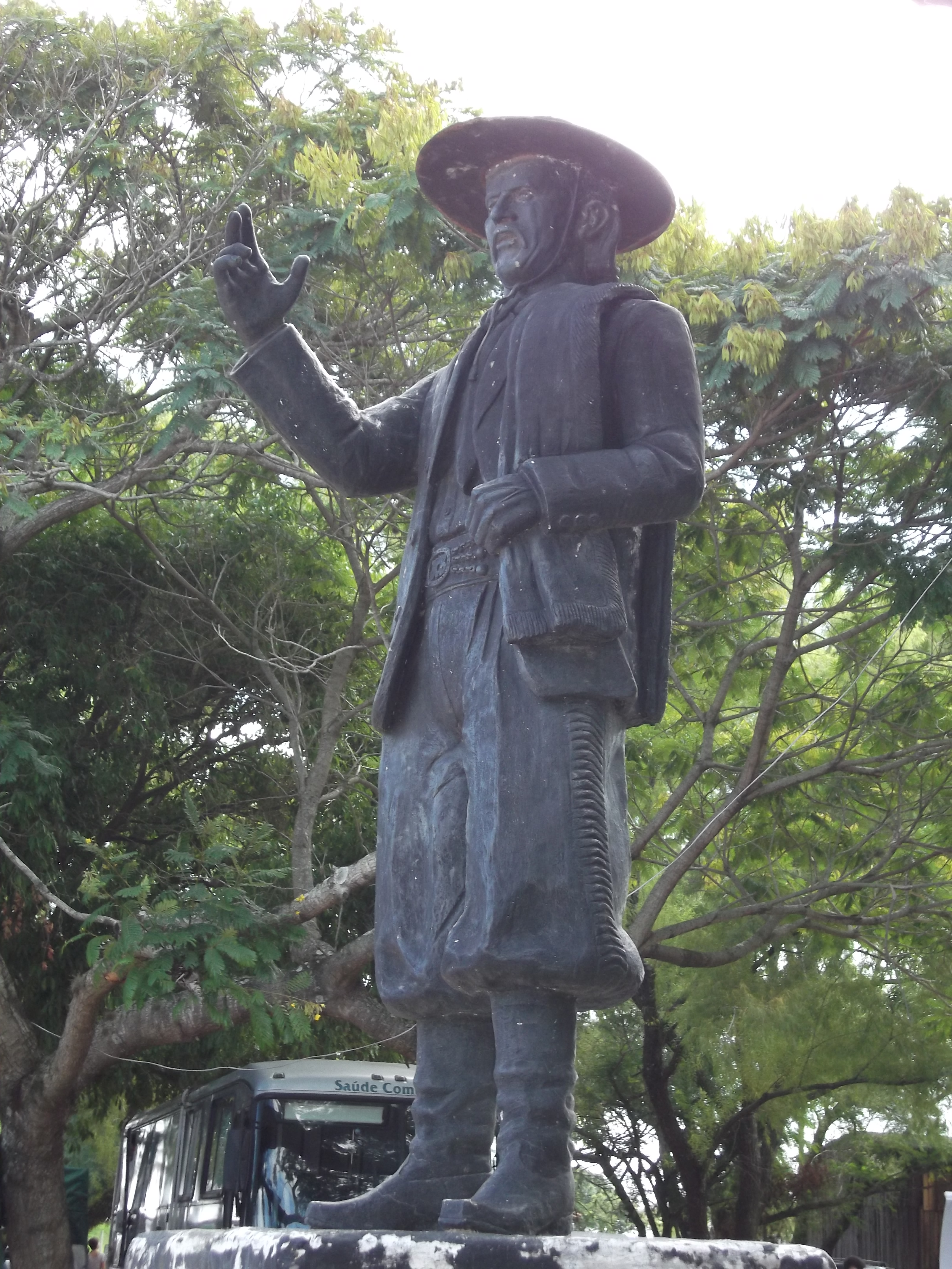 Jayme Caetano Braun, Parque da Harmonia, Porto Alegre, Brasil